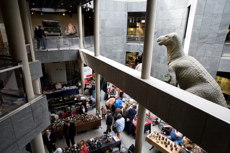 Innenraum des Naturkundemuseums in Dortmund